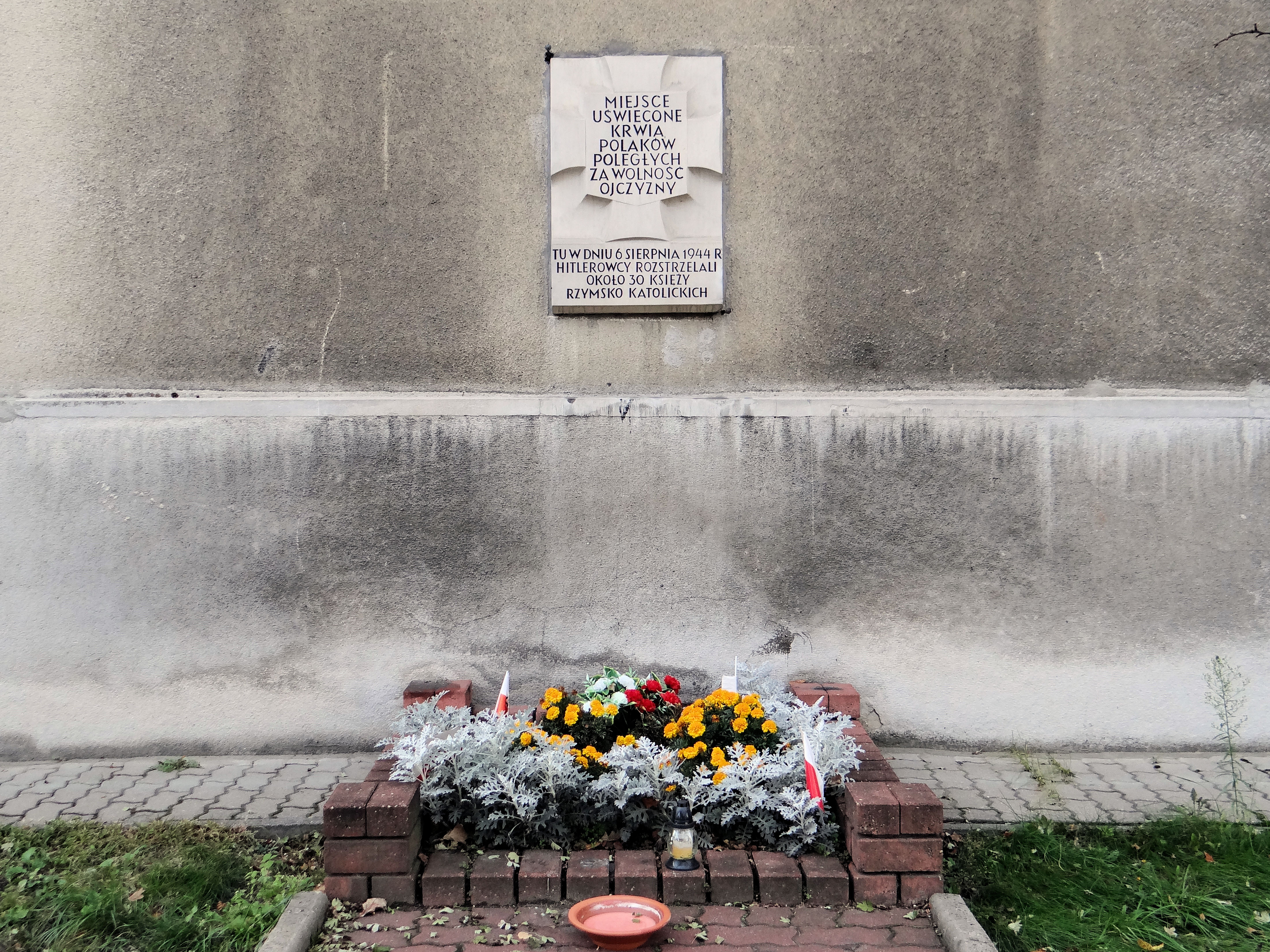 Tablica Tchorka upamiętniająca 30 księży rzymsko - katolickich rozstrzelanych w tym miejscu dnia 6 sierpnia 1944 r